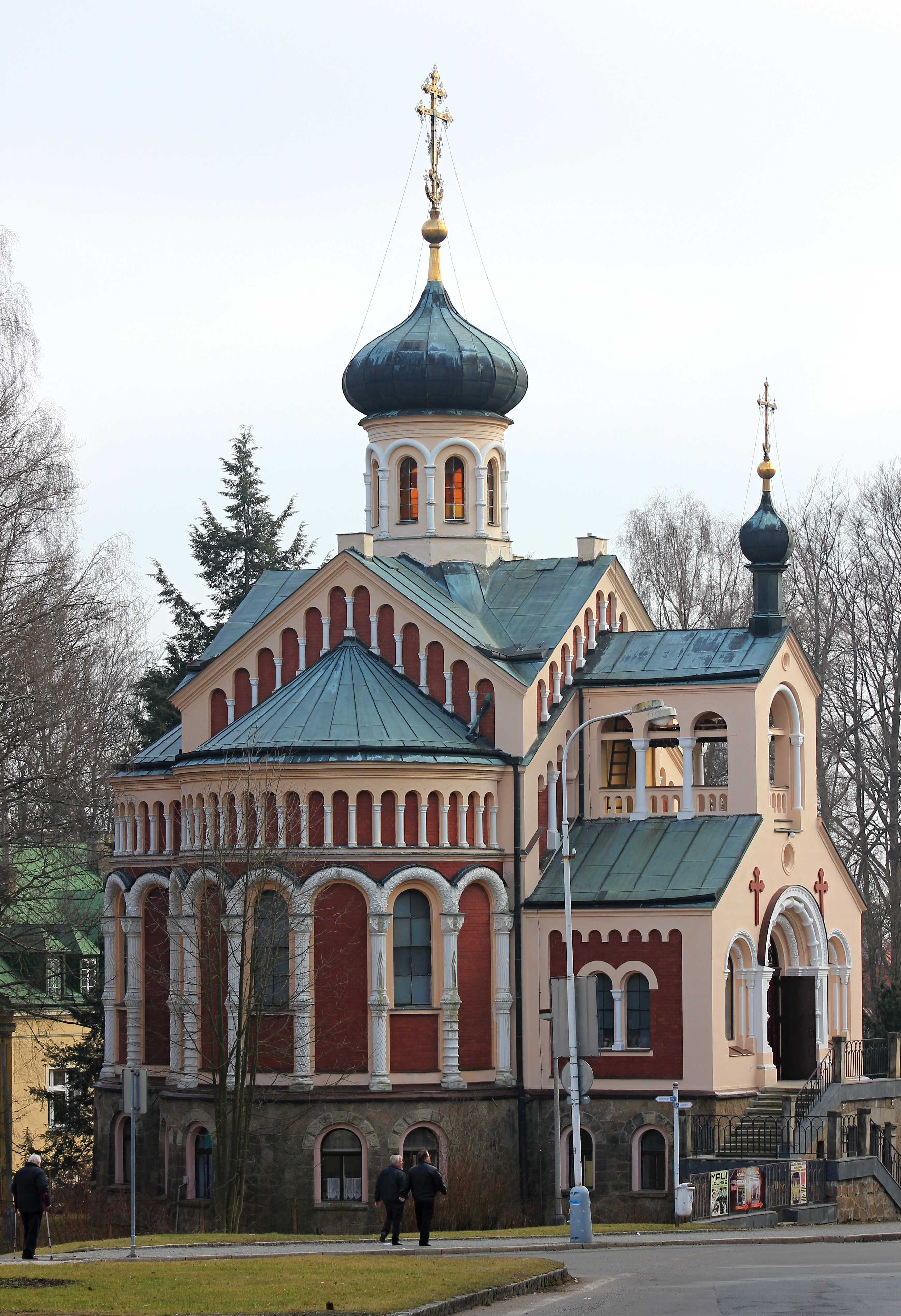 Die russisch-orthodoxe Kirche des Heiligen Wladimir.Mariánské Lázně - Marienbad. 1900-1902. Ruská Str. 347/9, 353 01 Mariánské Lázně. Tschechien.